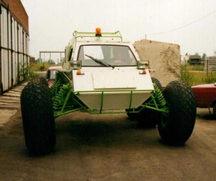 Арктика — вездеход-амфибия на шинах сверхнизкого давления, производился ассоциацией «Арктиктранс».